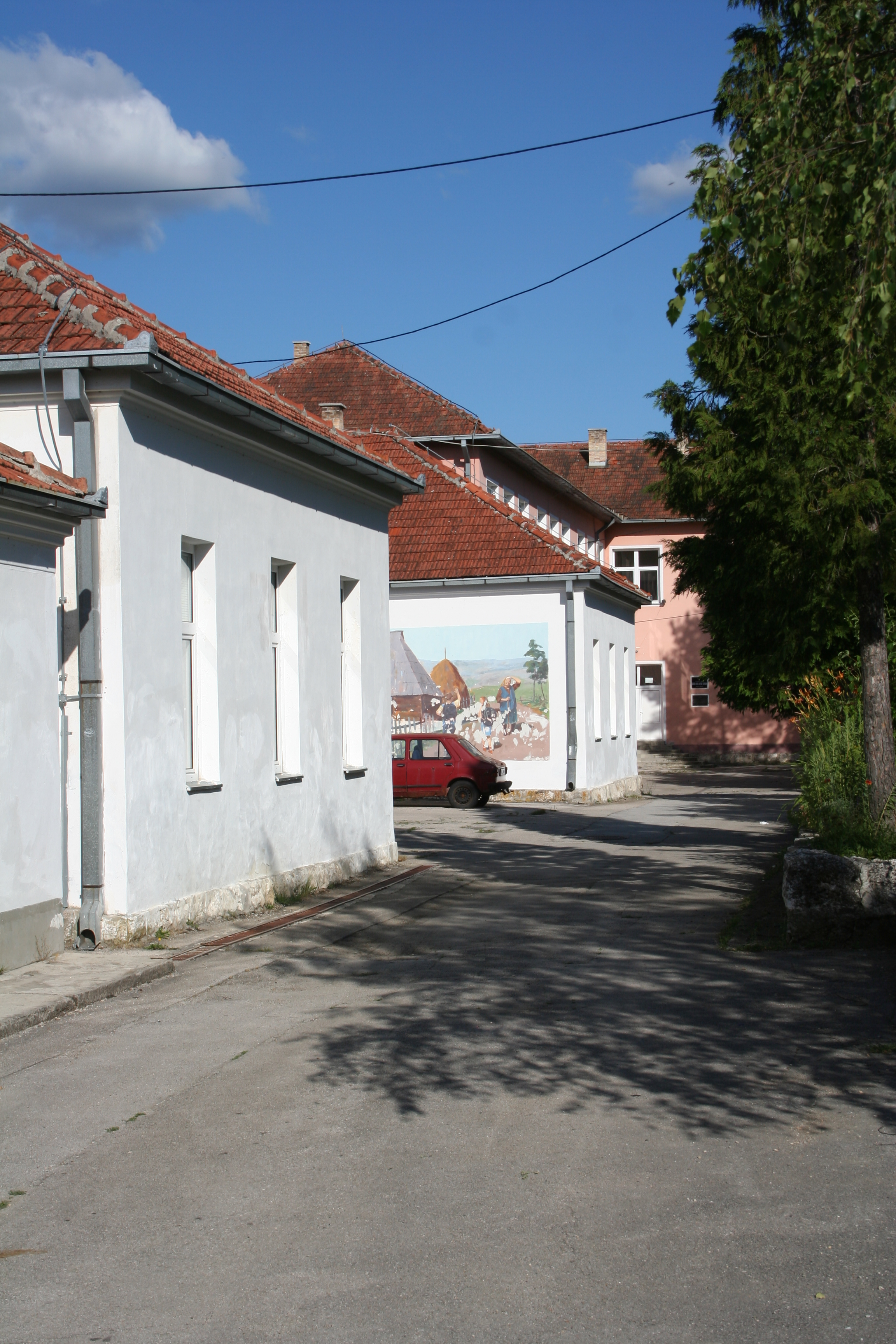 Škola u Kremnima